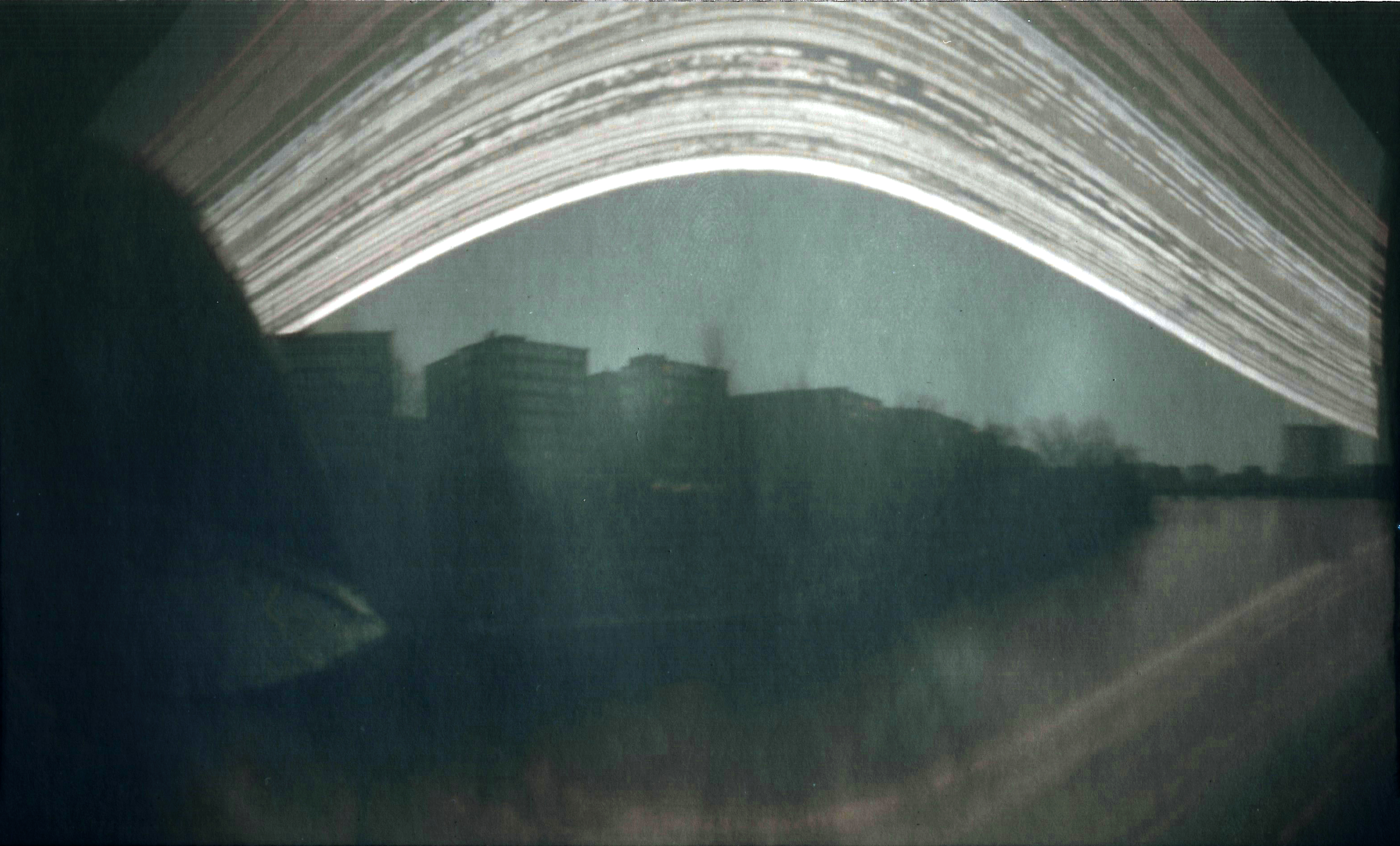 Solarigrafía de los recorridos del sol entre el verano de 2014 y marzo de 2015 desde el puente Condesa Eylo sobre el Pisuerga, Valladolid.